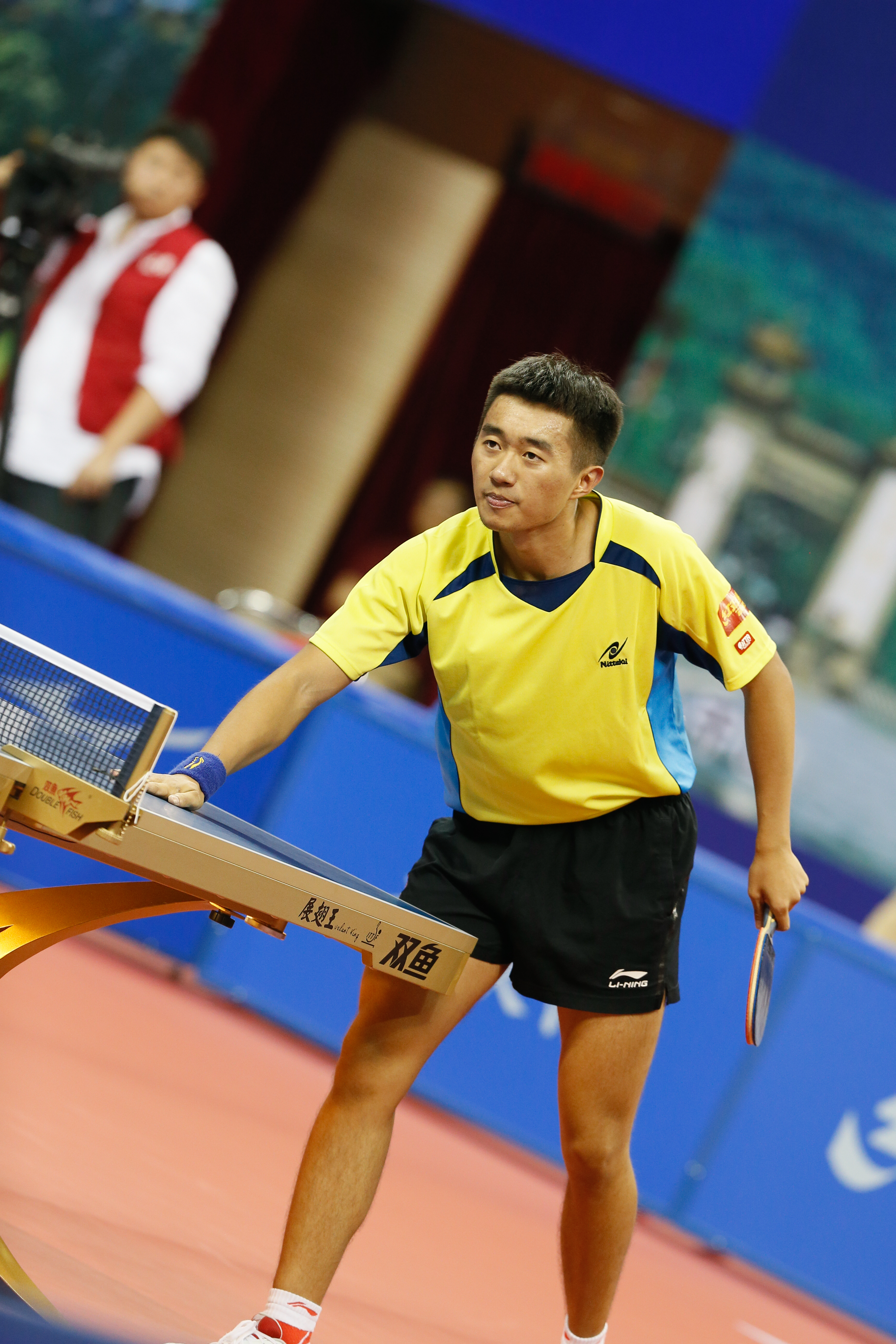 _K0K9399